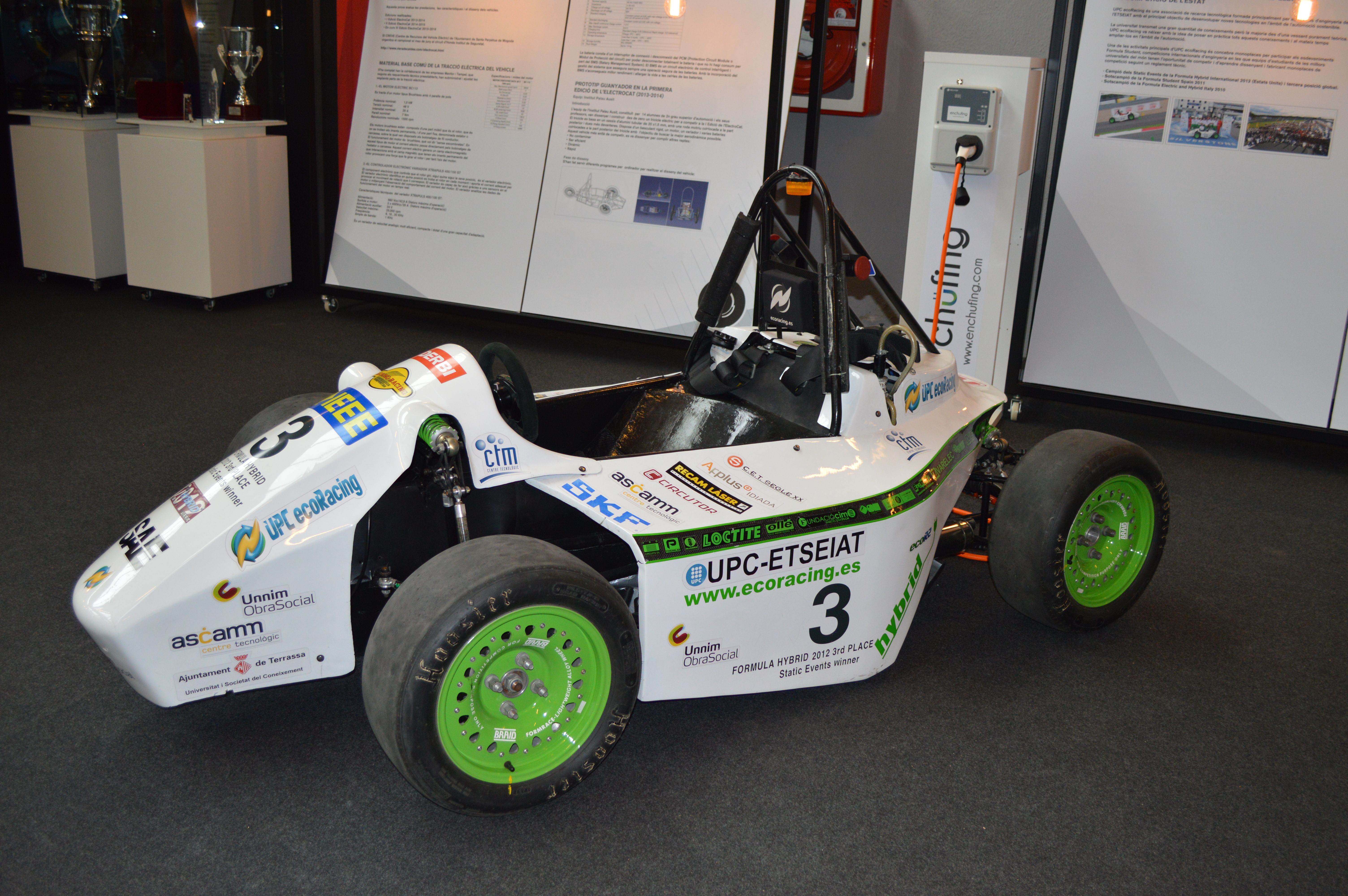 Vehicle de competició de Formula Student UPC ecoRacing de tecnologia híbrida.